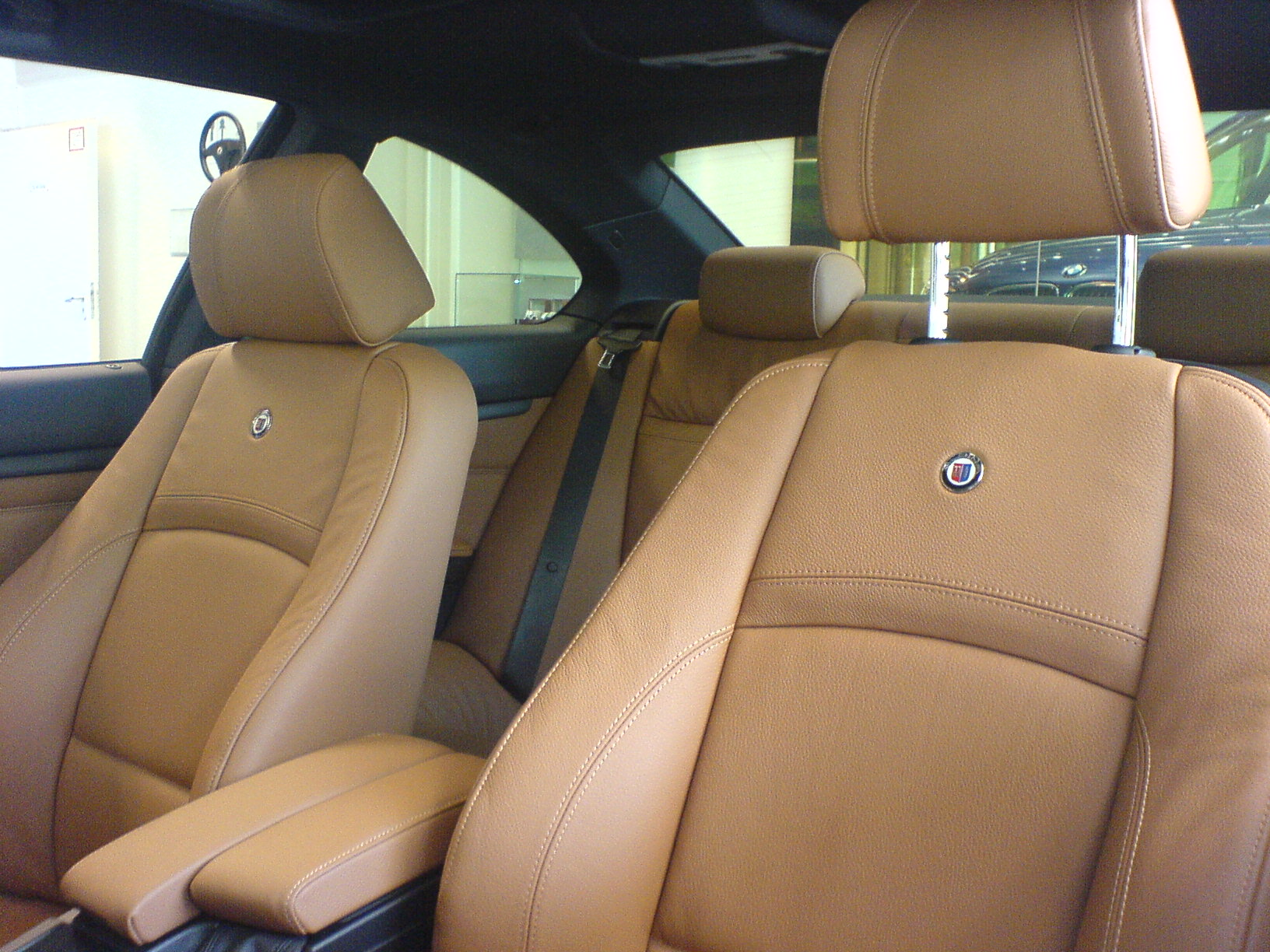 Serienmäßige Leder-Vordersitze in der Farbe "Dakota" und eingenähtem Alpina-Emblem in einem BMW Alpina B3 Biturbo Coupé (Baureihe E92, Bj. 2008) DSC00931.JPG